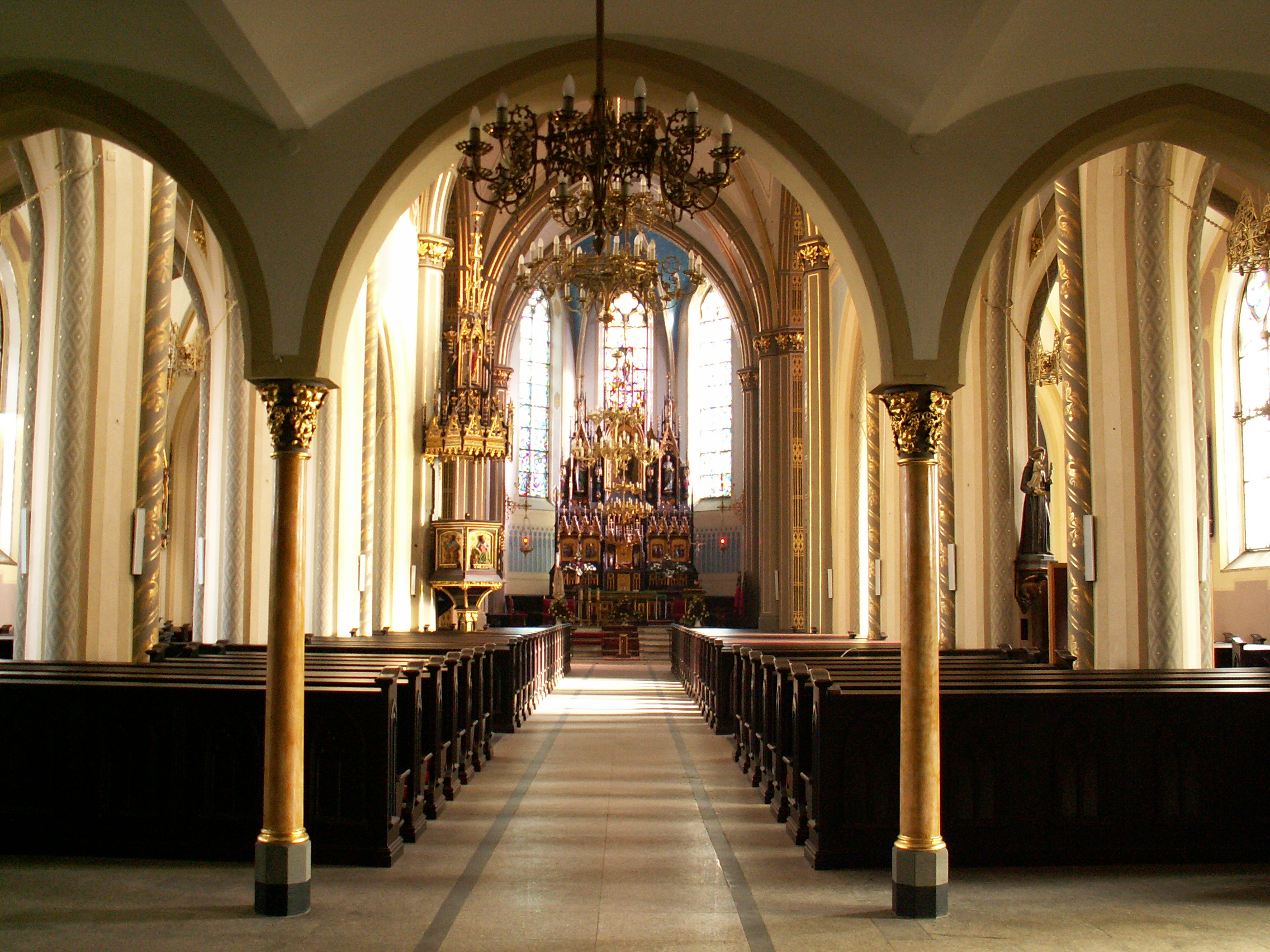 Radzionków, kościół św. Wojciecha, widok na ołtarz